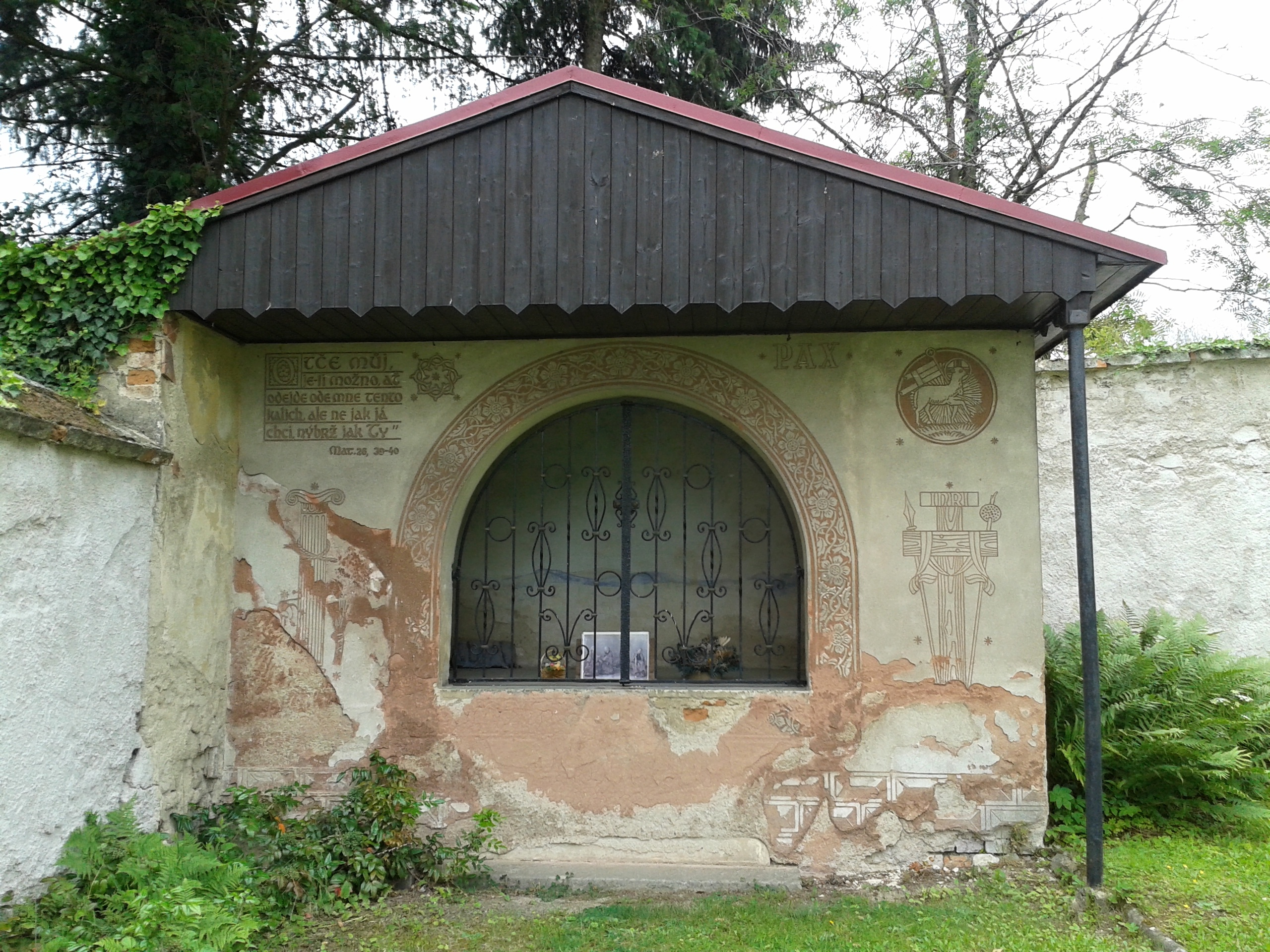 Getsemanská zahrada Pustiměř